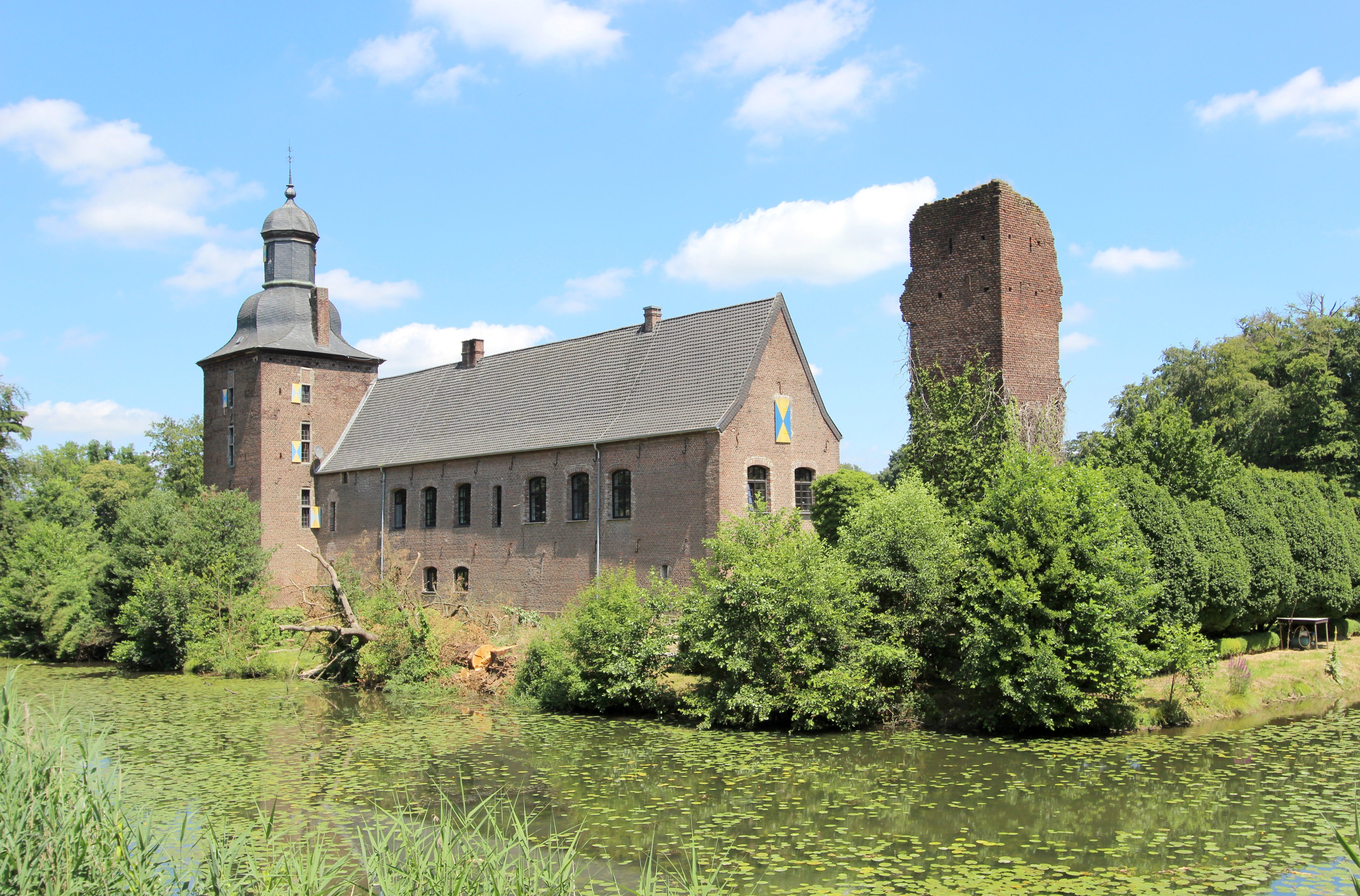 41844 Wegberg, Gerderhahner Str. 1. Schloss Tüschenbroich ist eine Schlossanlage bei dem Dorf Tüschenbroich, etwa 25 km westlich von Mönchengladbach im Quellgebiet der Schwalm. Aufnahme von 2018.